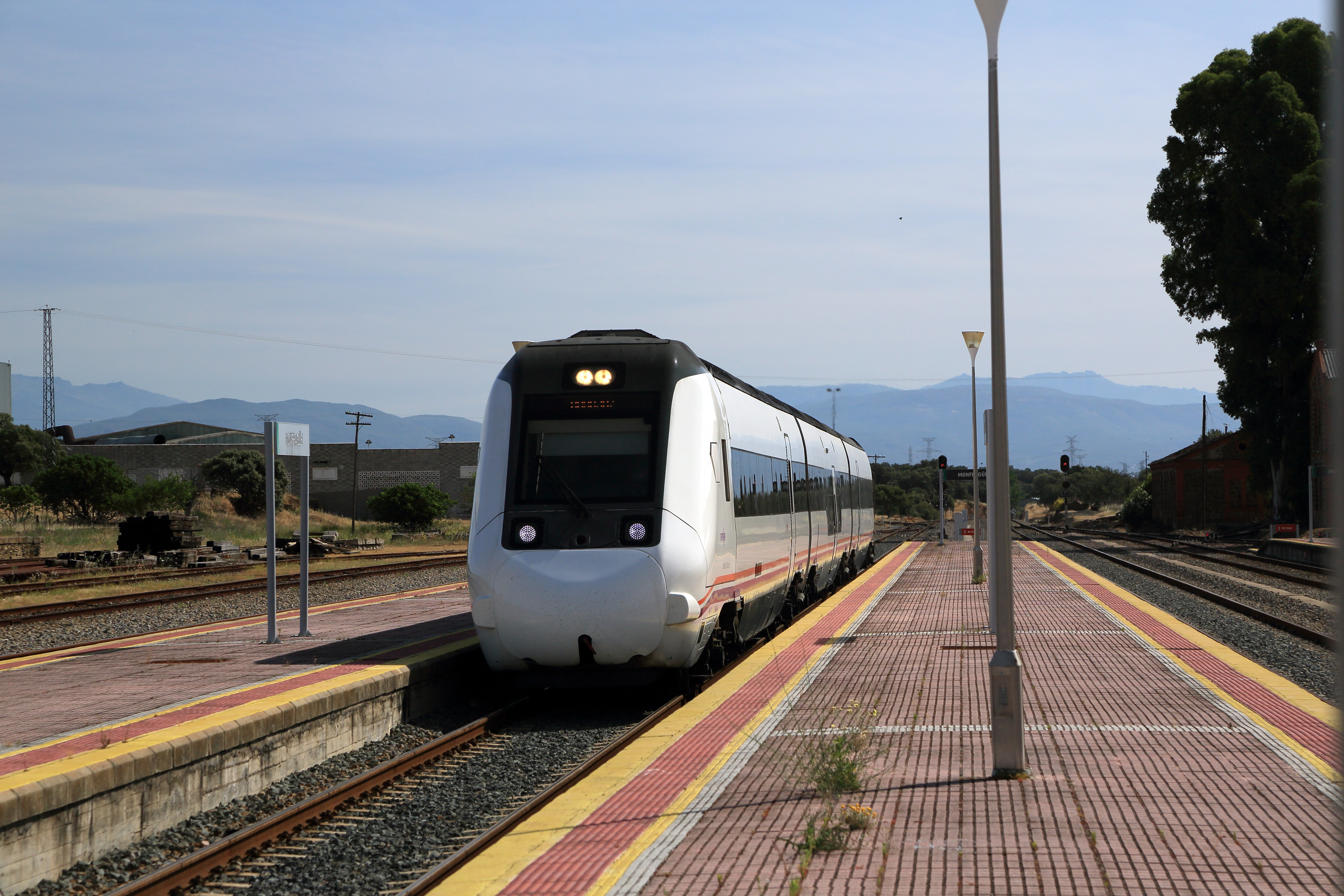 Eilzug (»Media Distancia«, MD) Madrid–Badajoz bei der Einfahrt in Monfragüe. Der Zug verkehrt über die Spitzkehre, um Plasencia mitzubedienen und fährt deshalb über das Bahnsteiggleis 2.